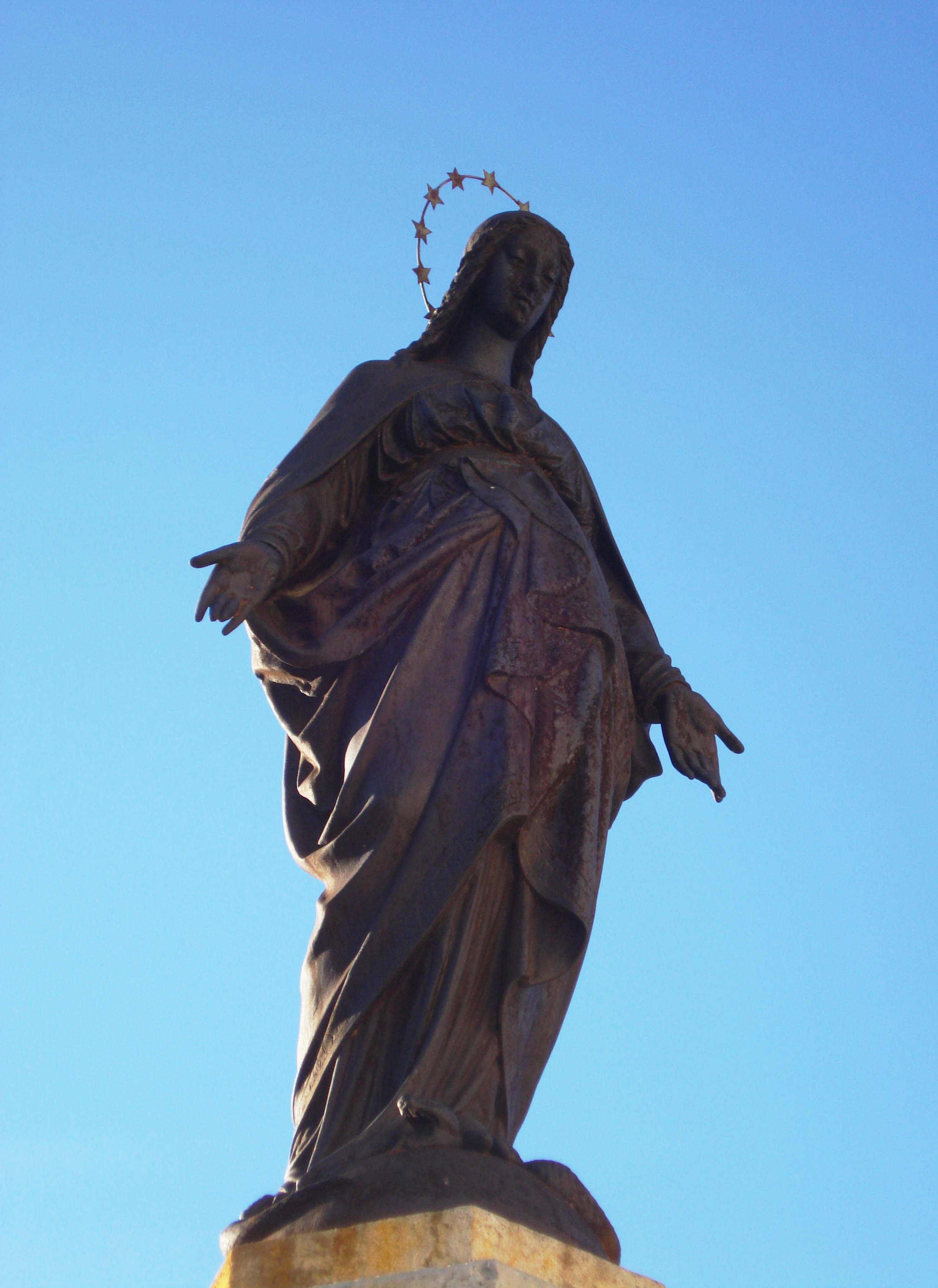 Estatua a Santa María Inmaculada en la plaza del mismo nombre de la capital palentina